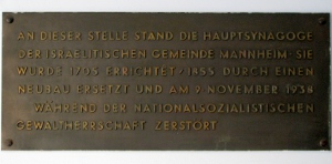 Gedenktafel Hauptsynagoge in Mannheim, F2.